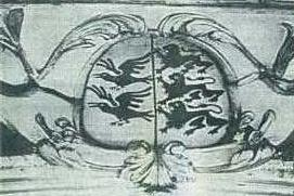 Wappen der Statthalterei Pfäffikon am Chorbogen der Schlosskapelle (vor der Renovation)